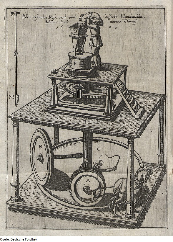 Original image description from the Deutsche FotothekMühle & Pferd